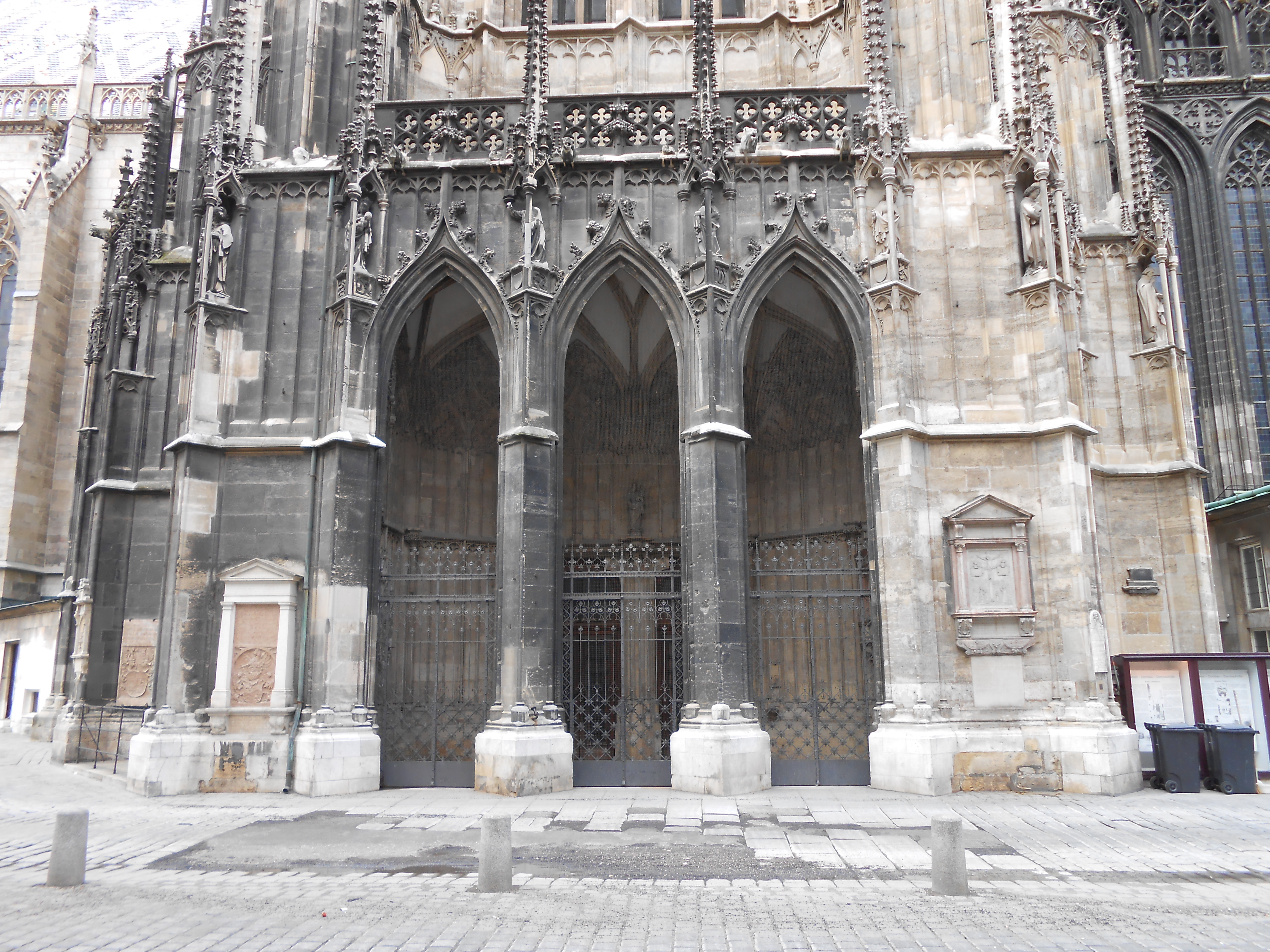 Adlertor am Stephansdom in Wien